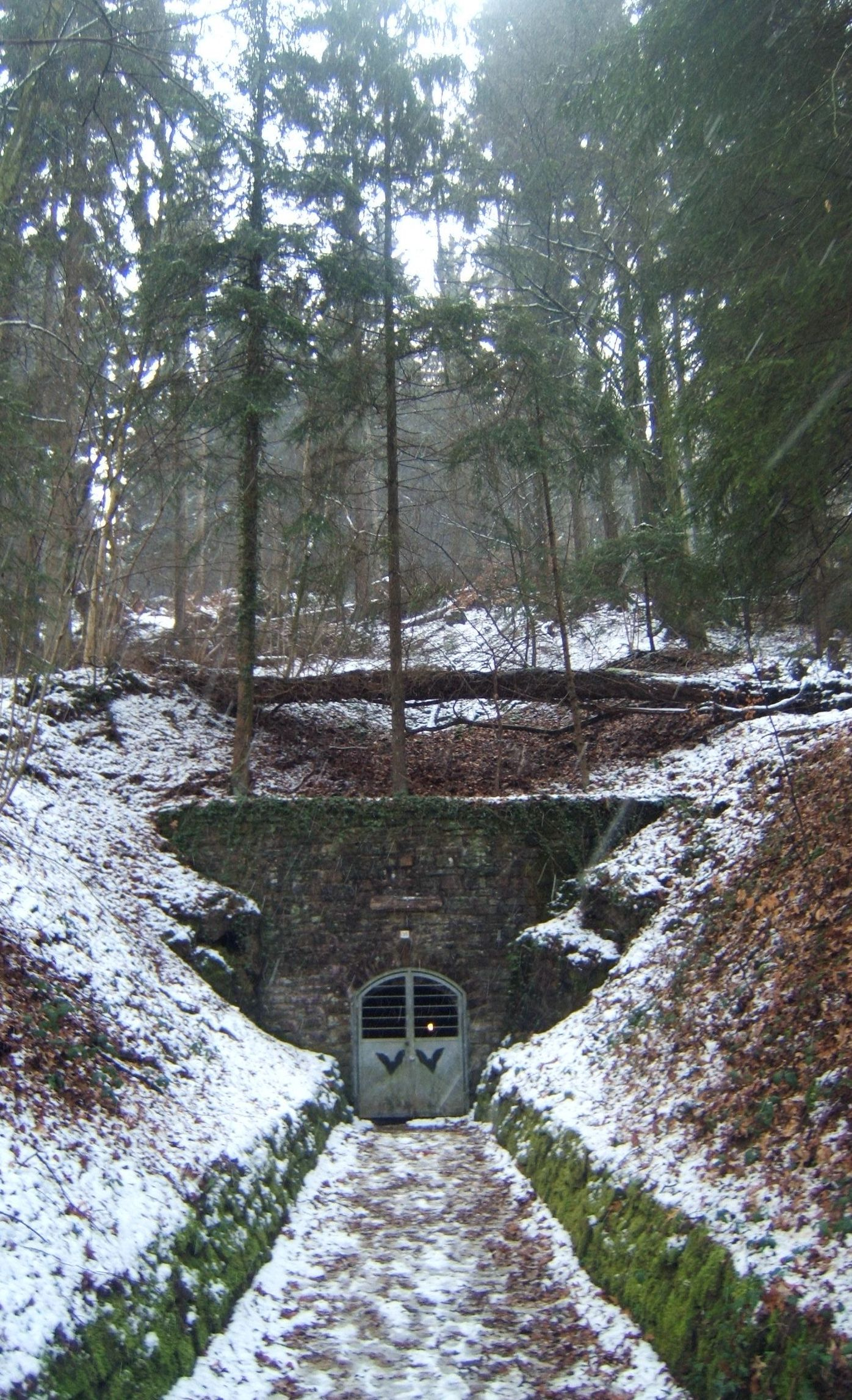 Eingang der Aggertalhöhle, Ründerodt (Engelskirchen)